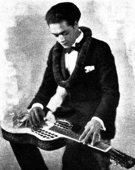 Hawaiian musician Sam Ku West